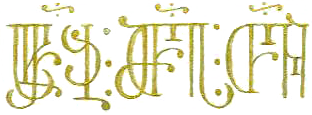 მოქვის ოთხთავიდან მათეს სახარების თავის დასაწყისი. დავით მაისურაძის ასლი.